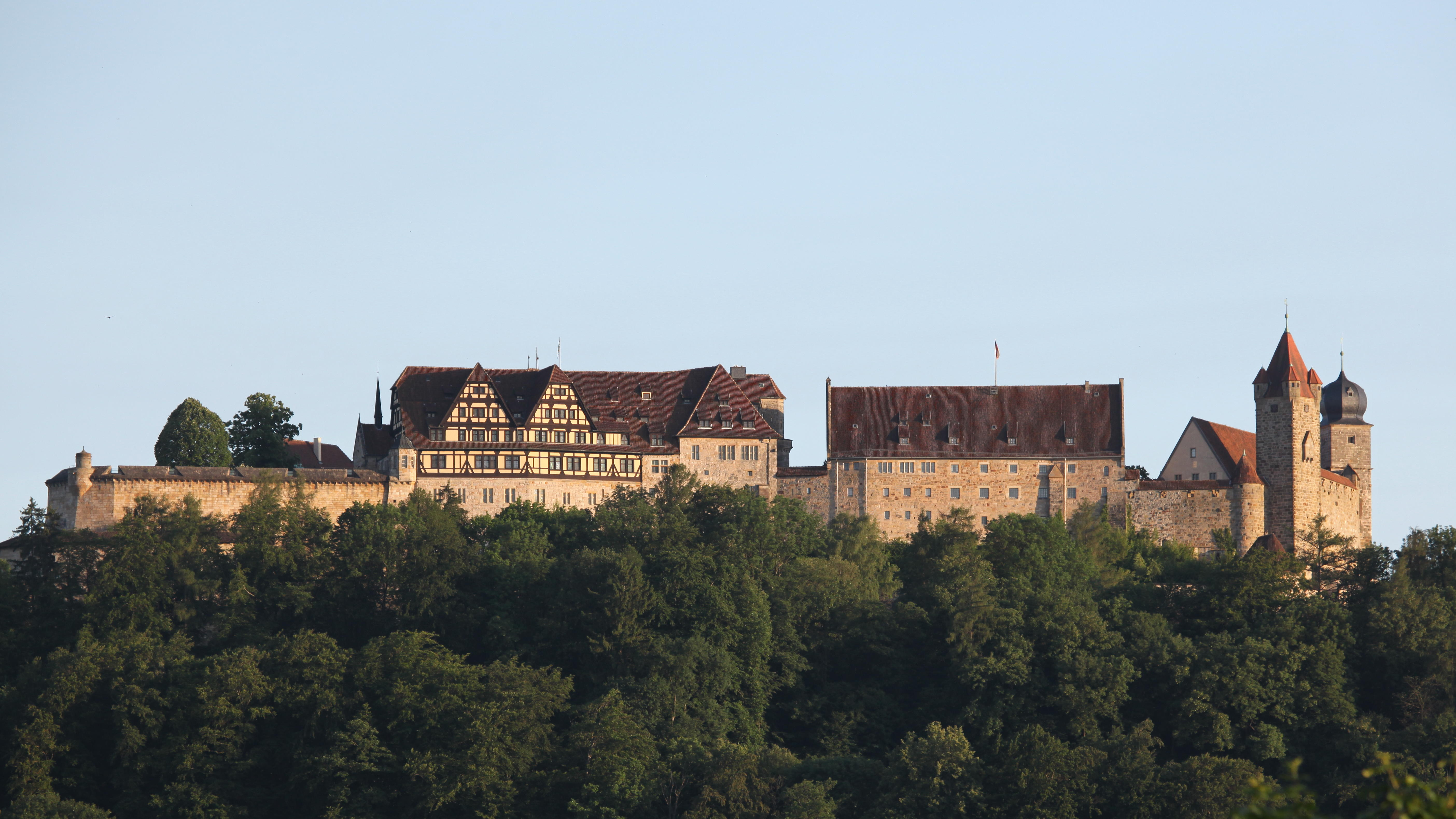 Vetse in Coburg, Nordseite